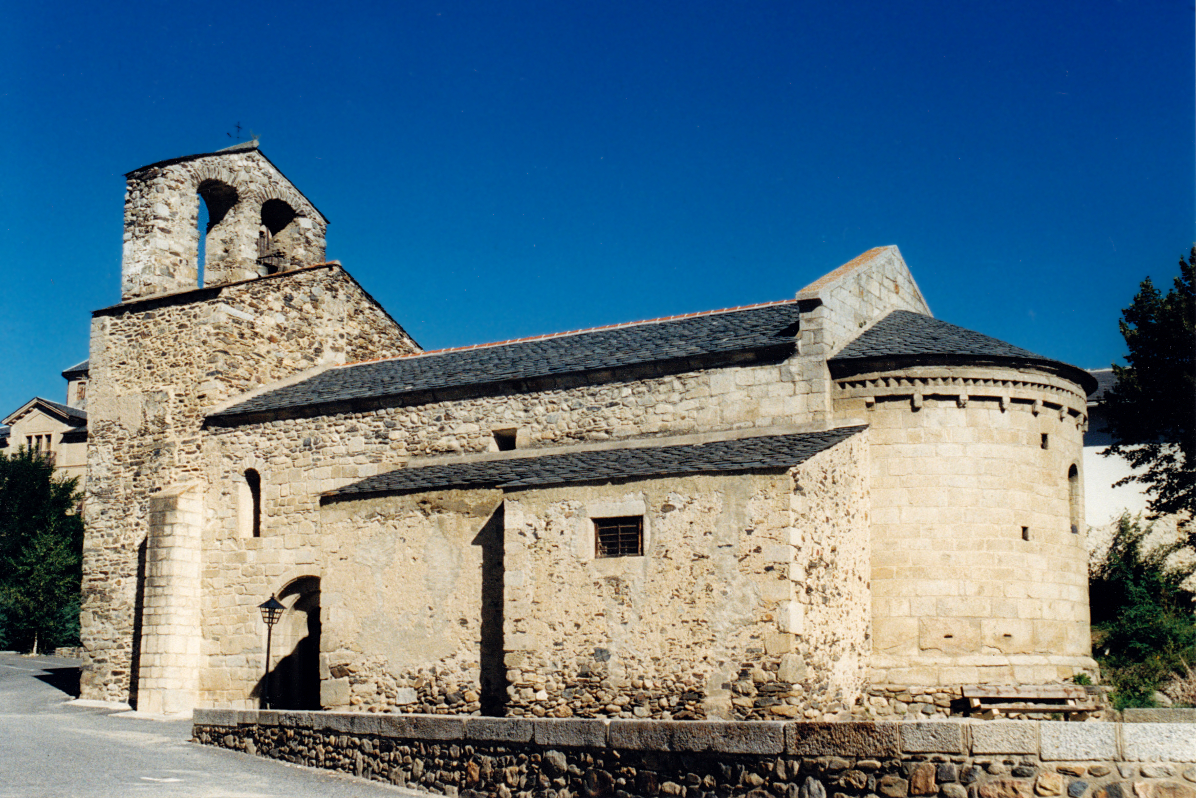 France - Cerdagne - Église Saint-Julien d'Estavar